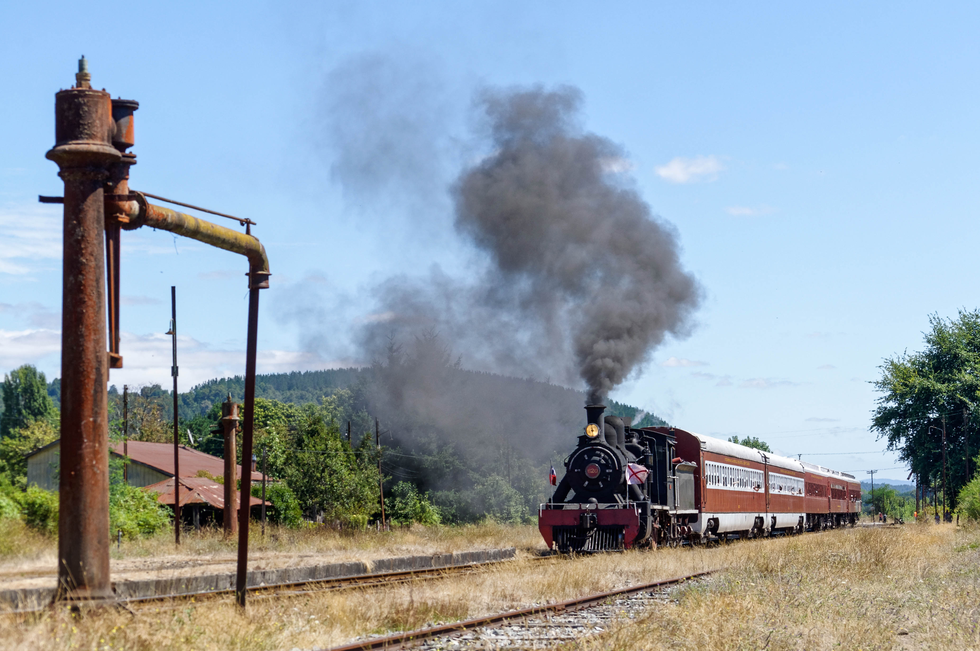 Cada dia que pasa, mas me encariño con esta negra! La 620 entrando todo vapor a su estación terminal del recorrido, Antilhue. Febrero 2015